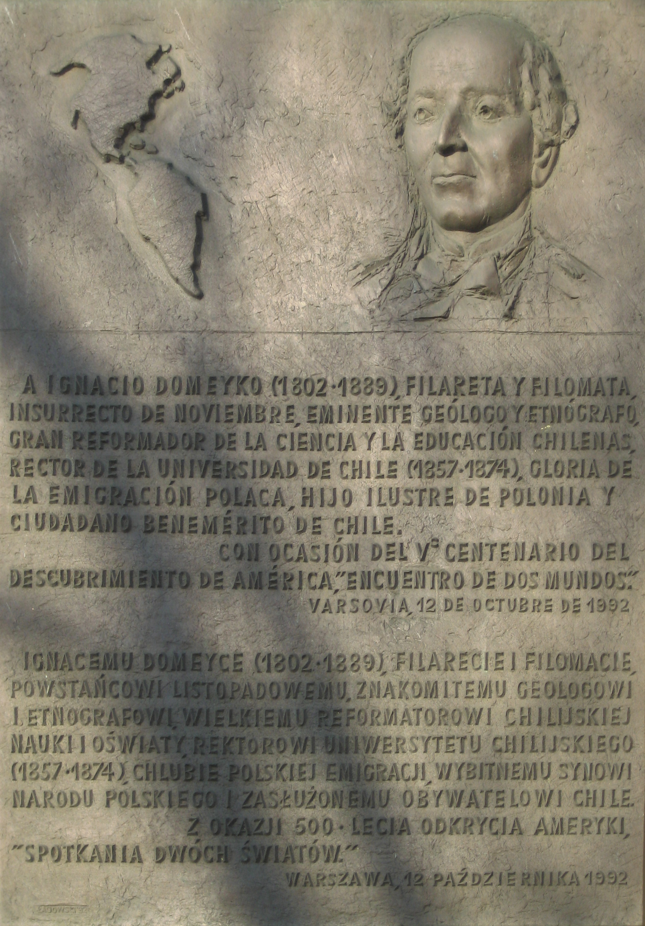 1992 plaque, with text in Spanish and Polish, honoring Ignacy Domeyko, at Krakowskie Przedmiescie 64, Warsaw, Poland.